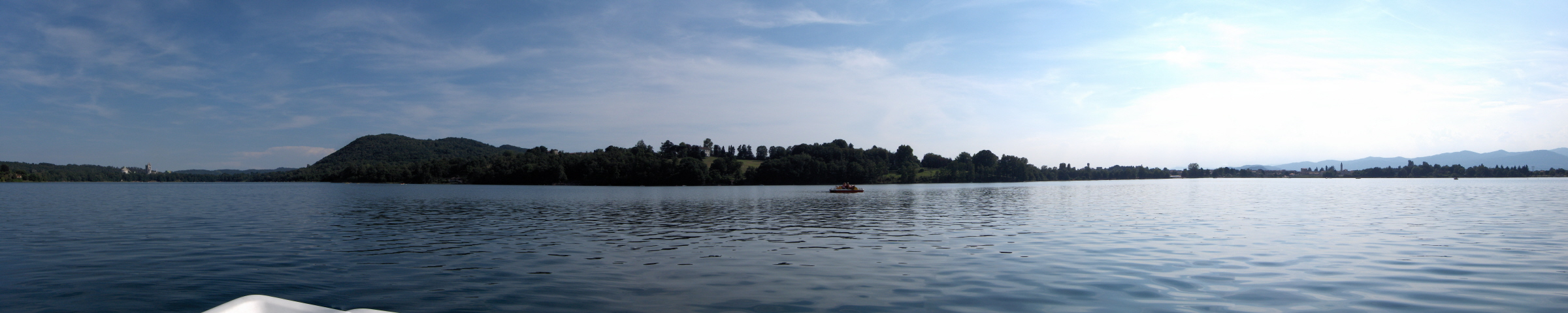 Foto panoramica scattata dal centro del lago di Monate (Varese)